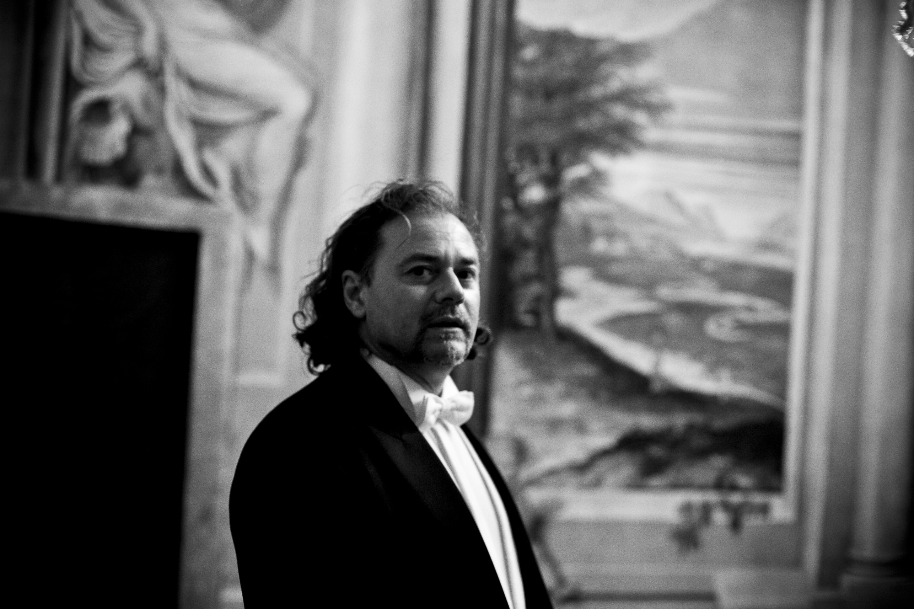 Alessandro Tortato, ritratto.